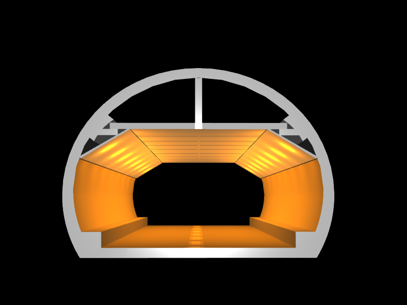 笹子トンネルの大まかな断面構造を再現した3Dモデル